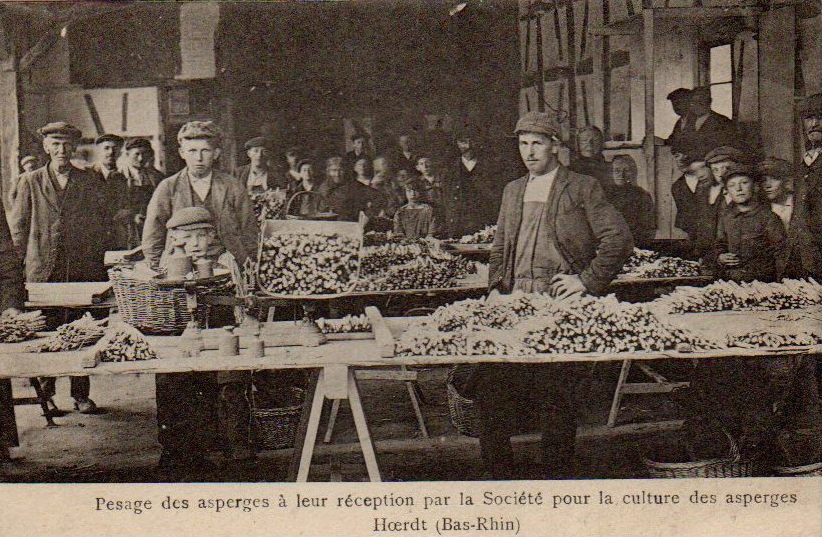 CPA Pesage des asperge Hoerdt ca 1930